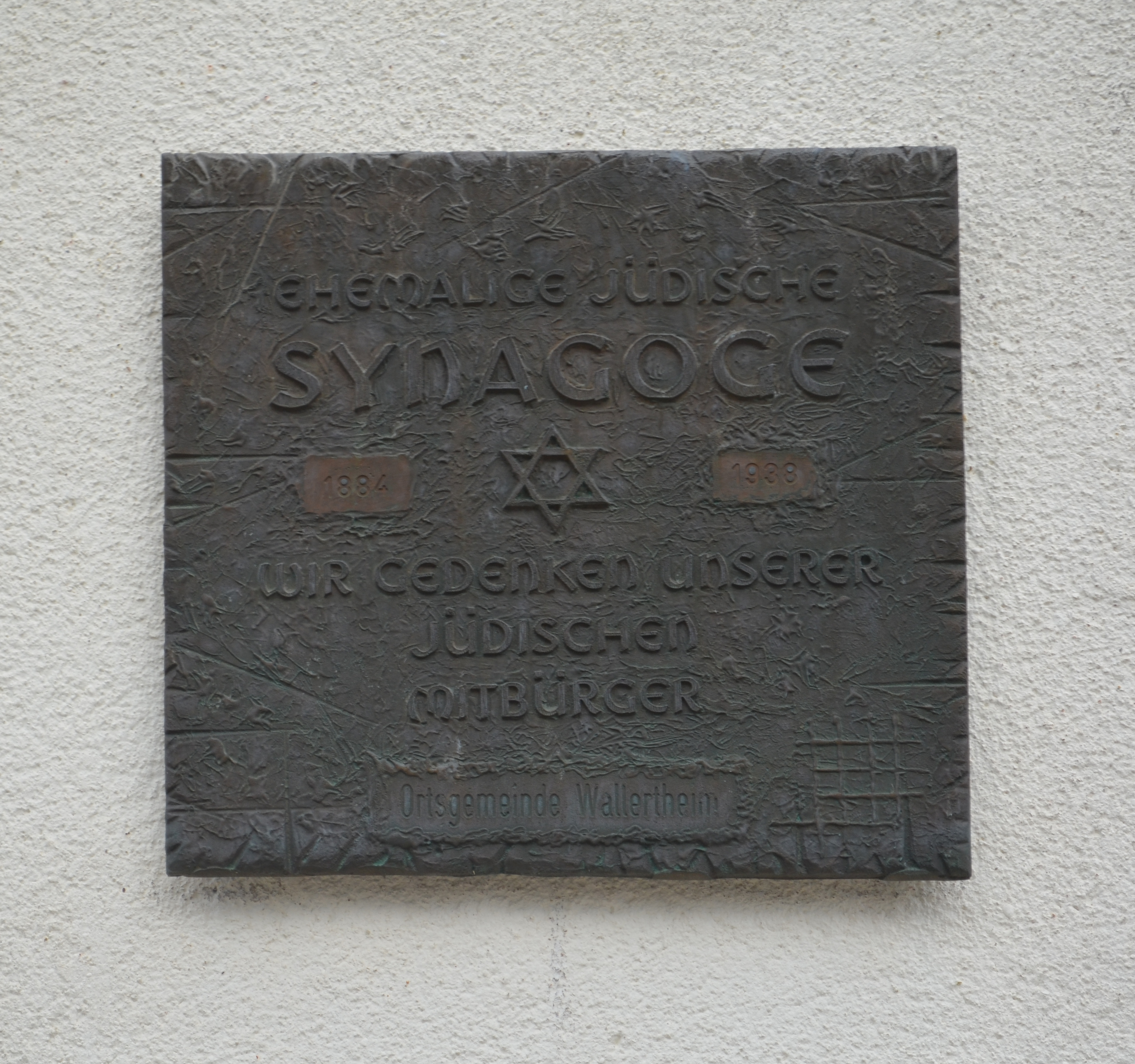 Wallertheim, Rathaus, Tafel Synagoge